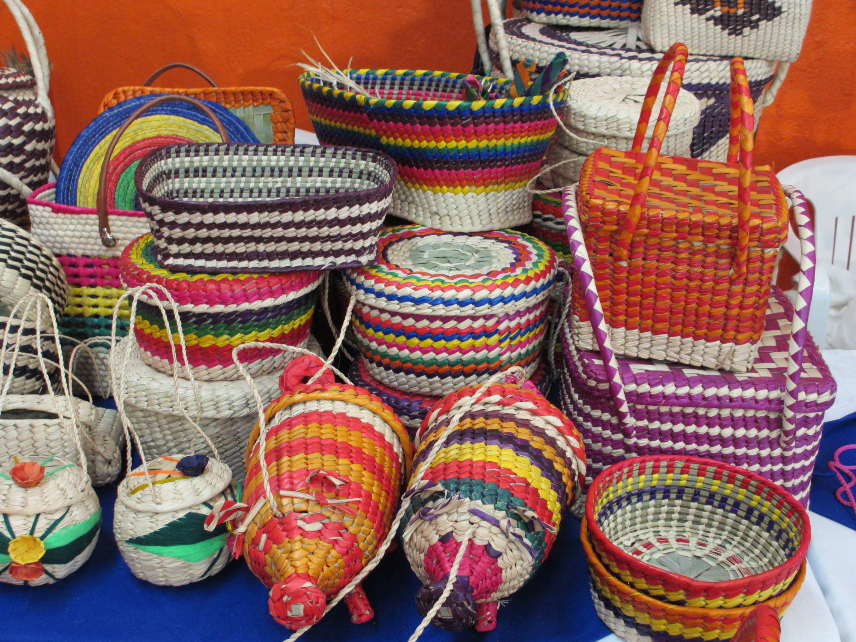 Figuras y cestos tejidos de hoja de palma de guano. Artesanía del municipio de Nacajuca, estado de Tabasco. México.